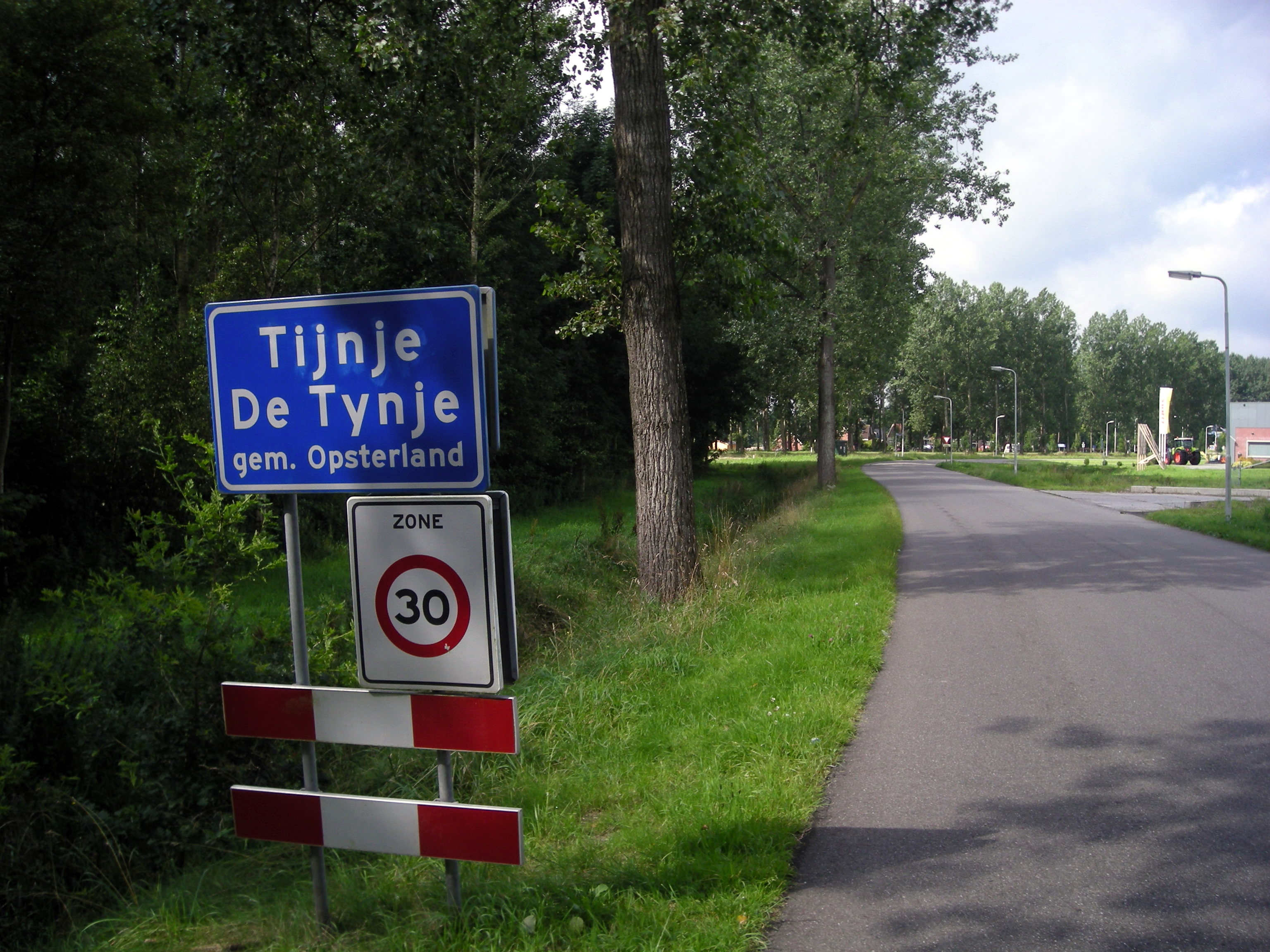 Tijnje, Opsterland